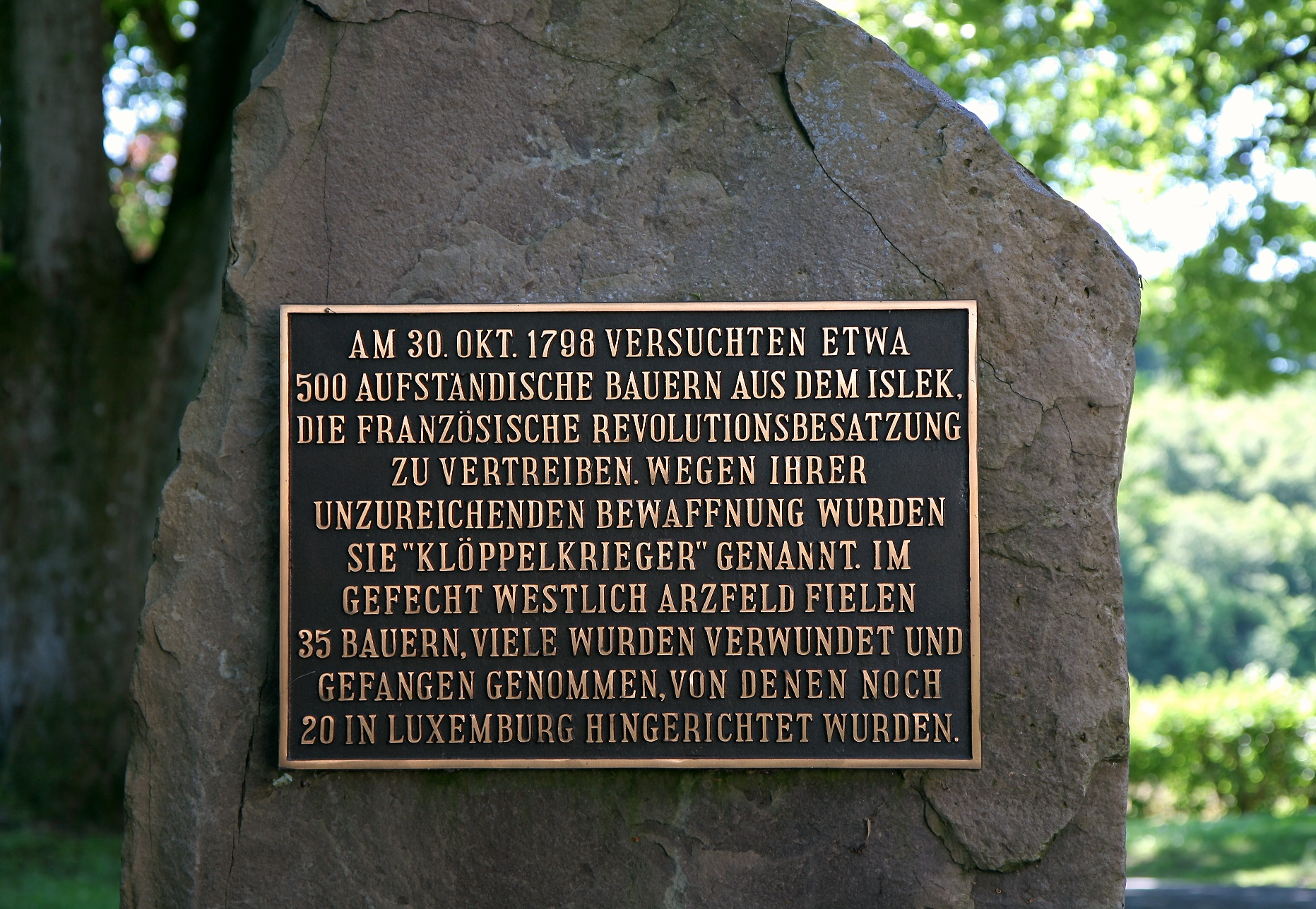 Klöppelkriegerdenkmal in Arzfeld.